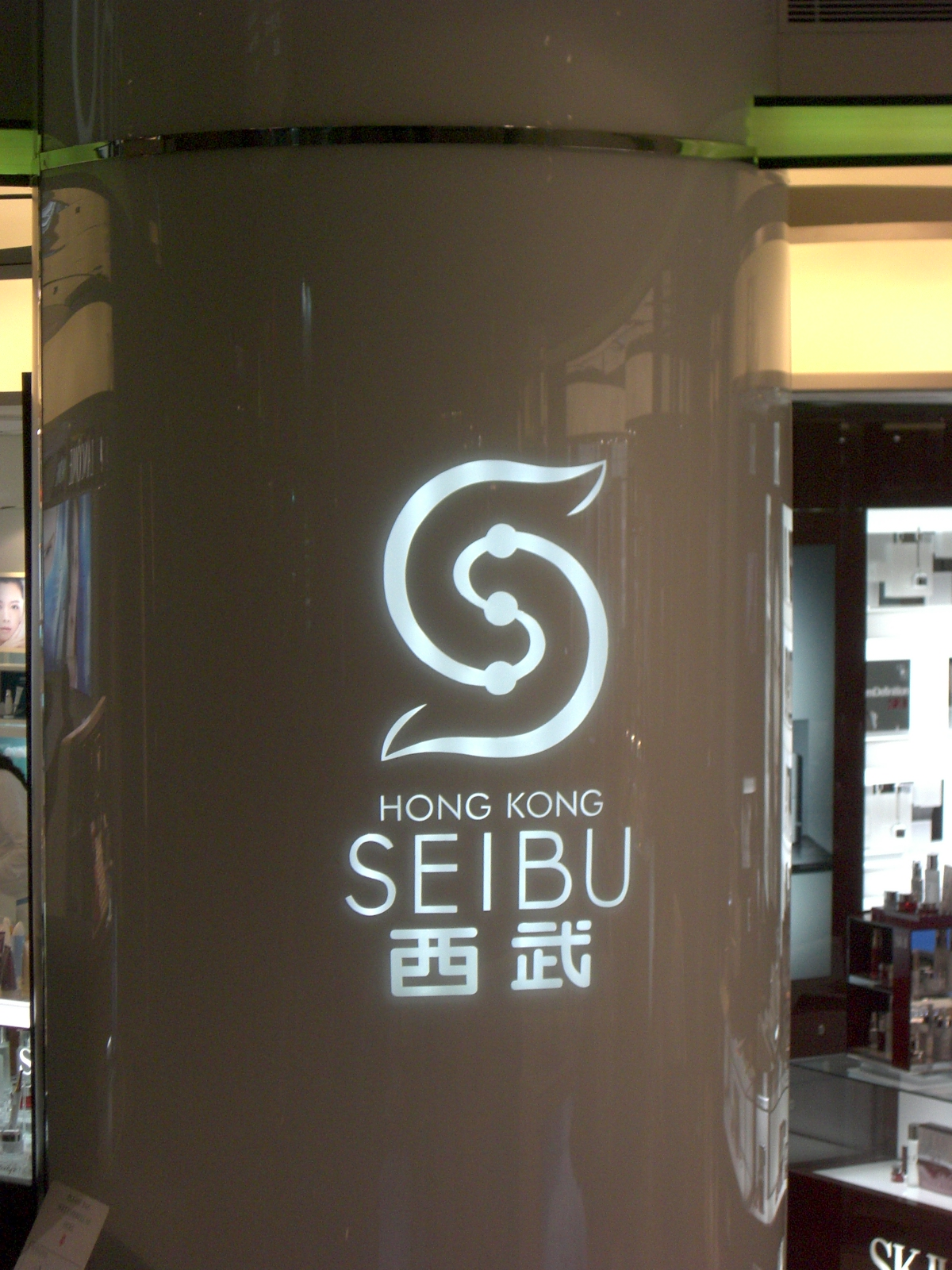 香港西武ロゴ